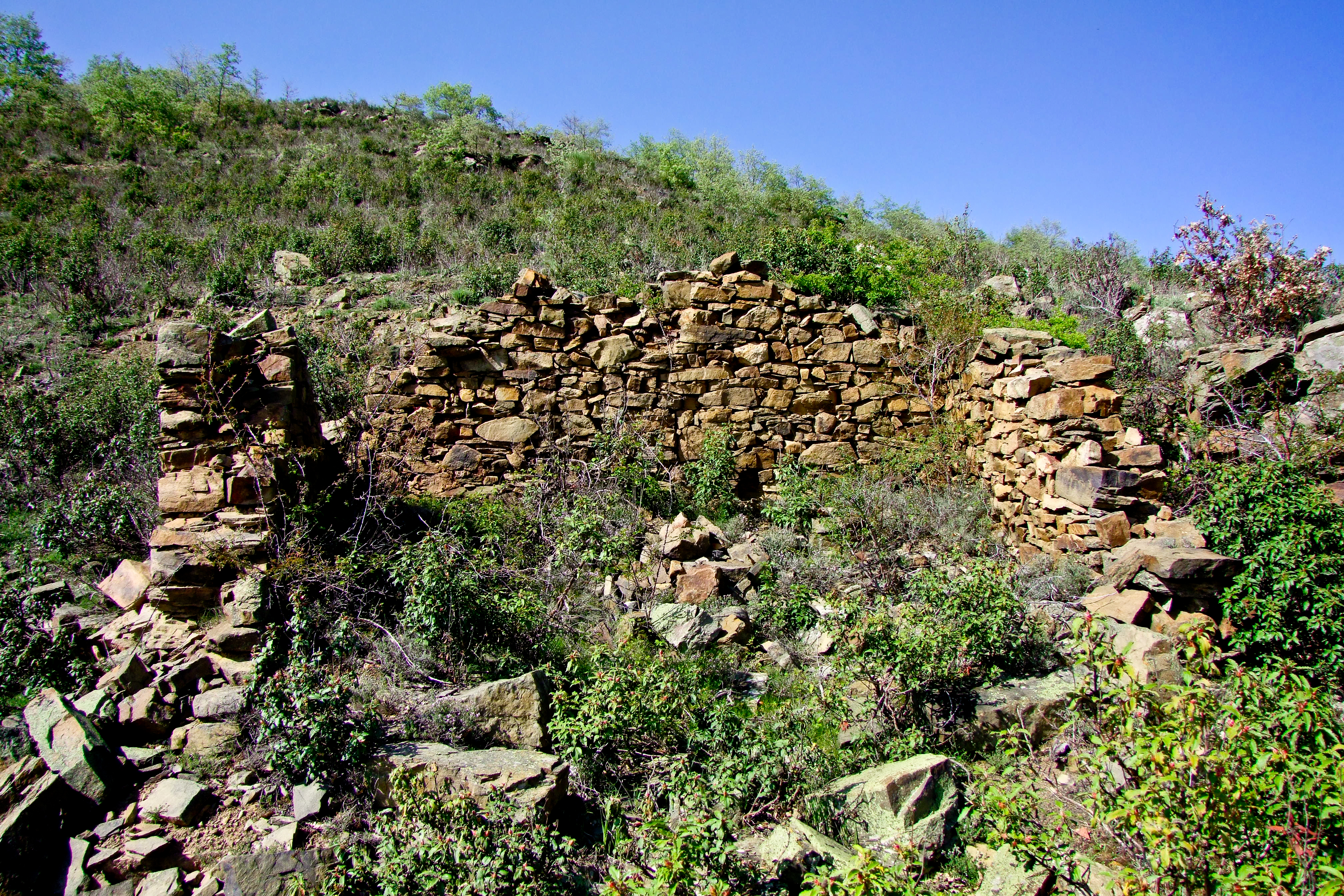 Ermita del Santo Cristo en la localidad de El Collado, La Rioja - España